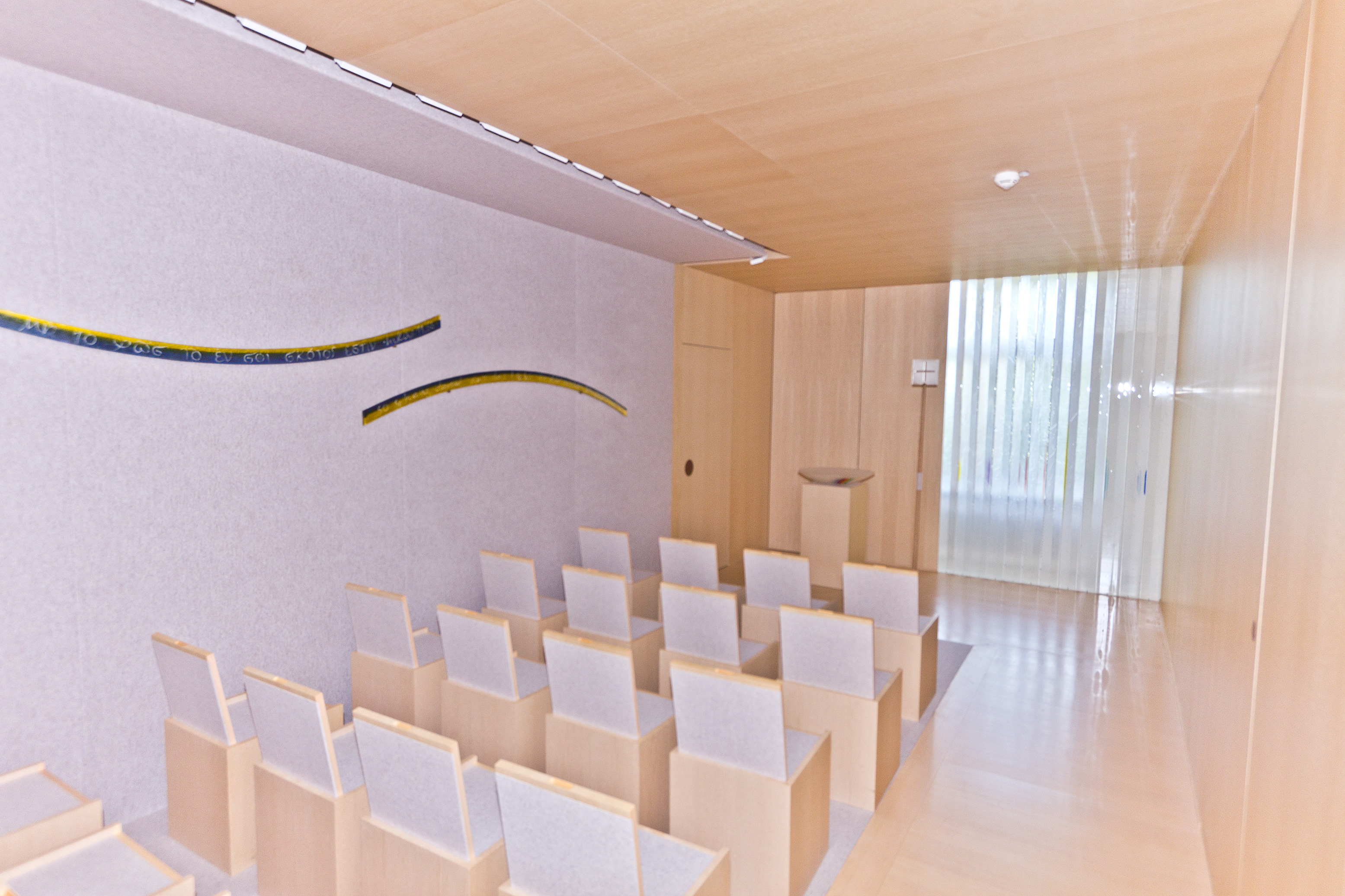 Wikipedia im Landtag – Bayern 17. bis 19. Juli 2012 in München Dieses Foto wurde im Rahmen des Projektes „Wikipedia im Landtag“ erstellt.